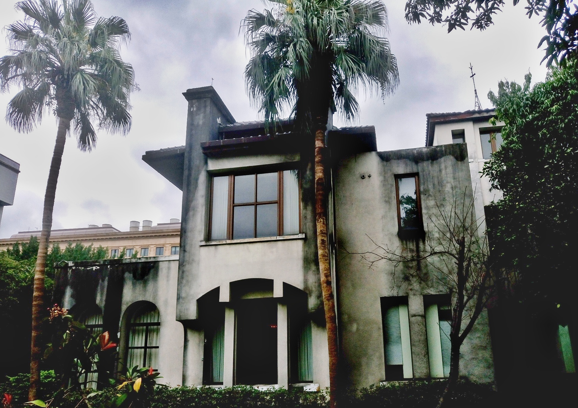 臺灣電力株式會社社長宿舍。